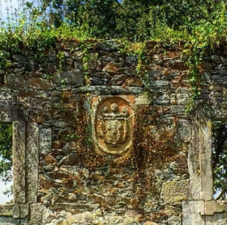 Escudu d'armes de Miranda nel Palaciu de Valdecarzana en Muros.